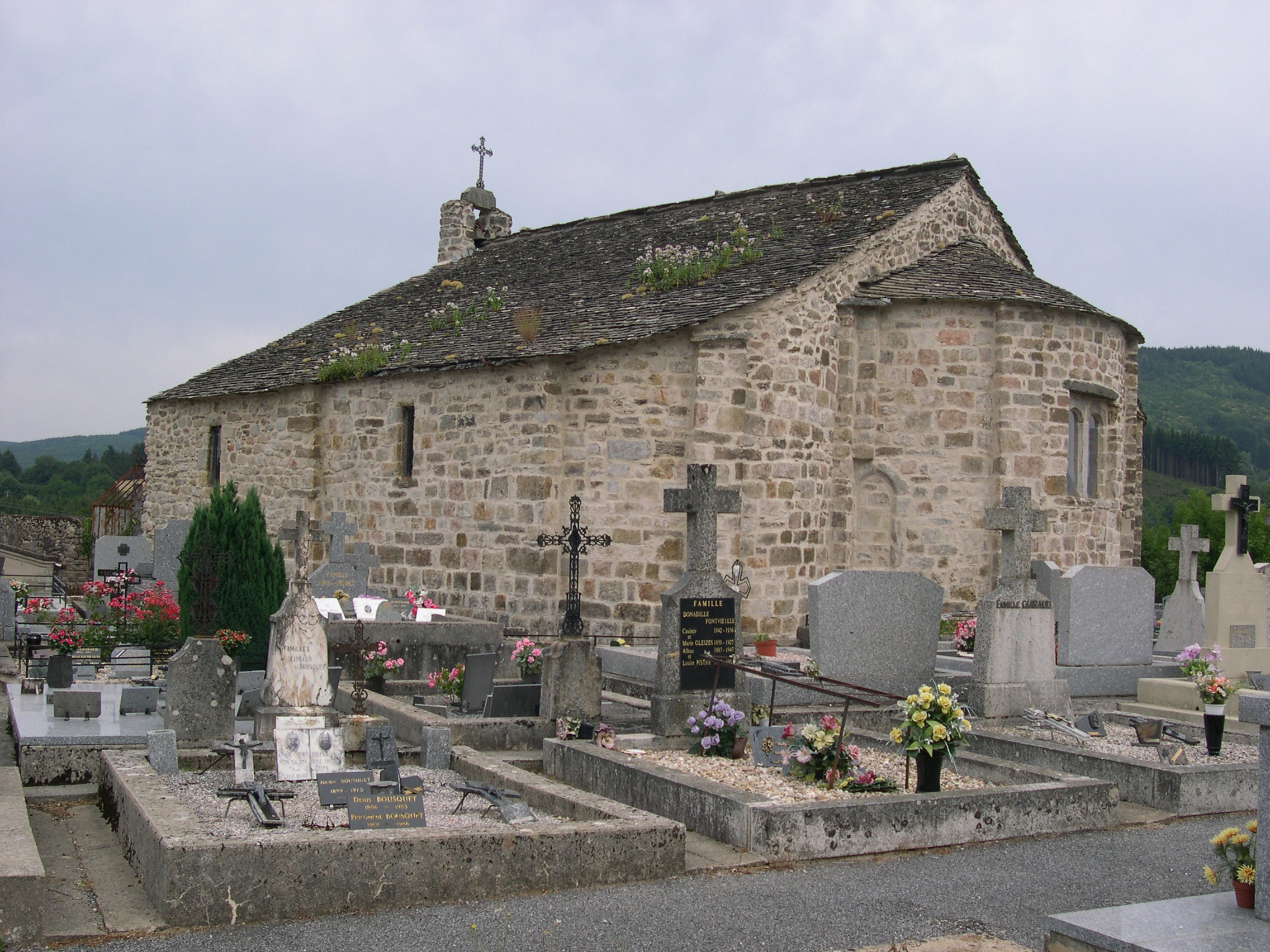 La Salvetat-sur-Agout (Hérault) - Chapelle romane St-Étienne de Cavall.